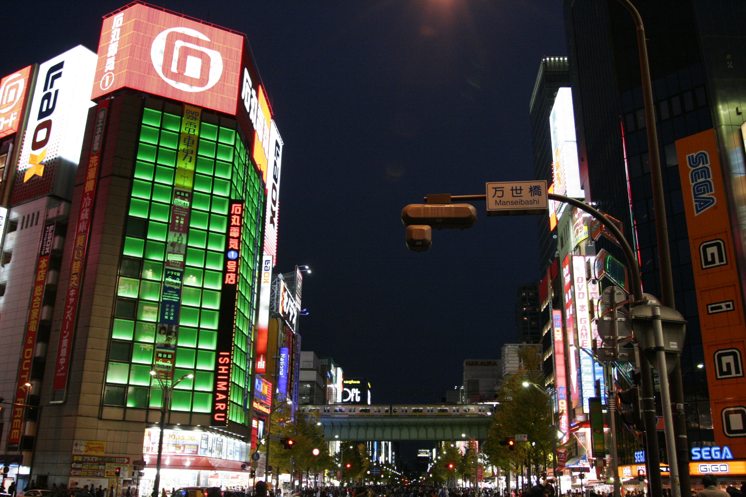 Akihabara, Tokyo, Japan